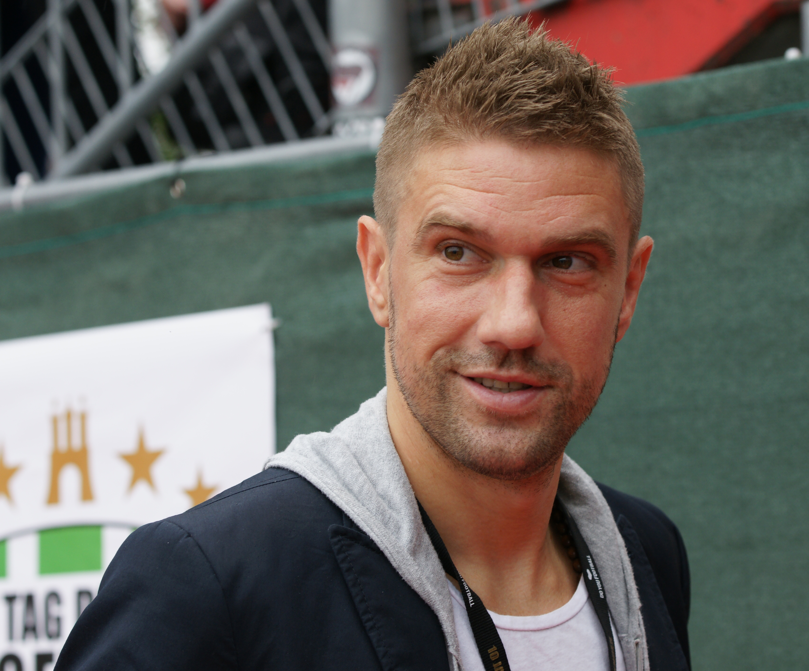 Tag der Legenden 2014 - Die Kapitäne entern Hamburg Fußballfest am Millerntor zugunsten NestWerk eV